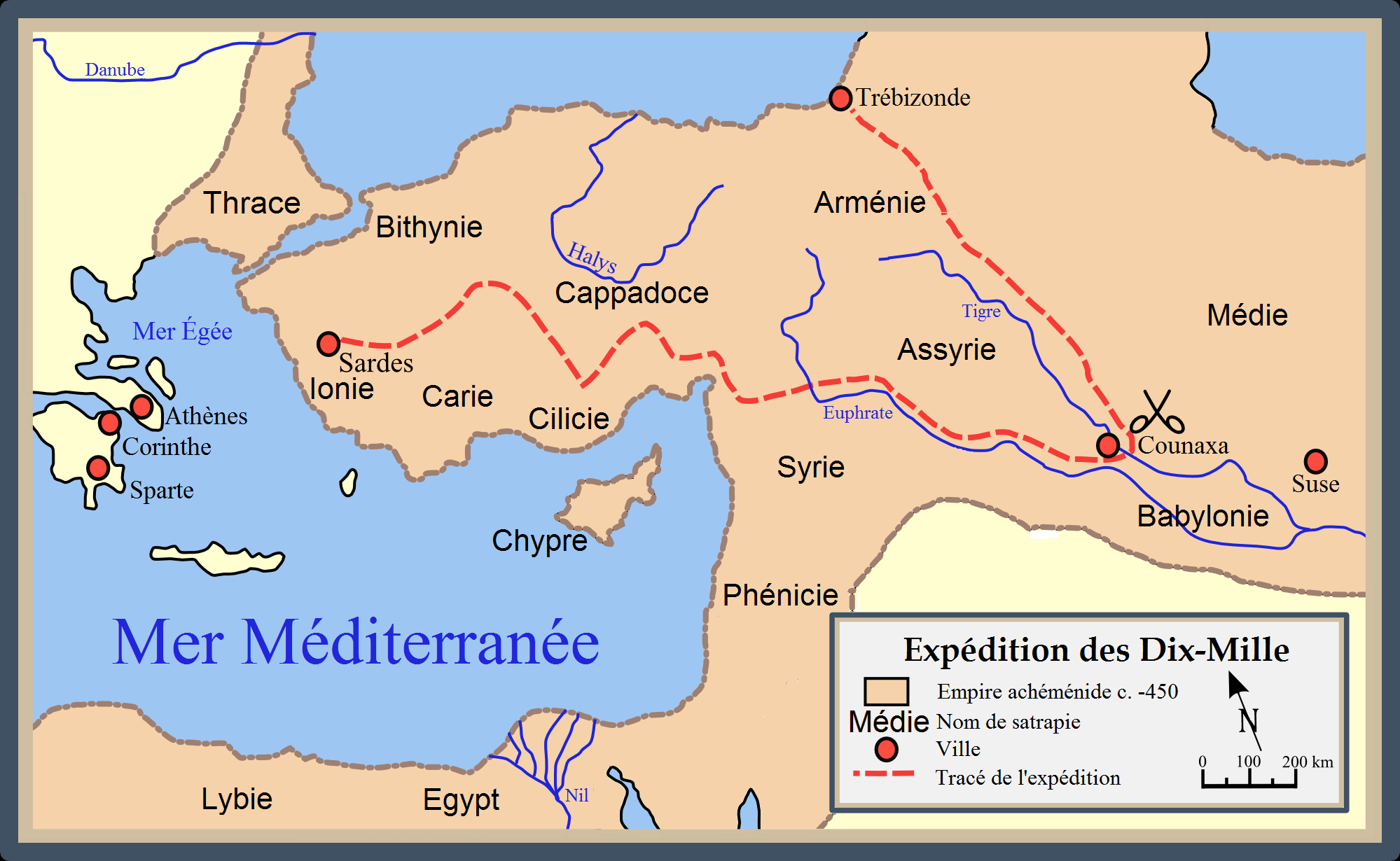 Tracé de l'expédition des dix-mille de l'Anabase. C'est une traduction en français de celle utilisée jusqu'à maintenant, créée par l'utilisateur polonais Killroyus : File:MarszDziesieciuTysiecy.png